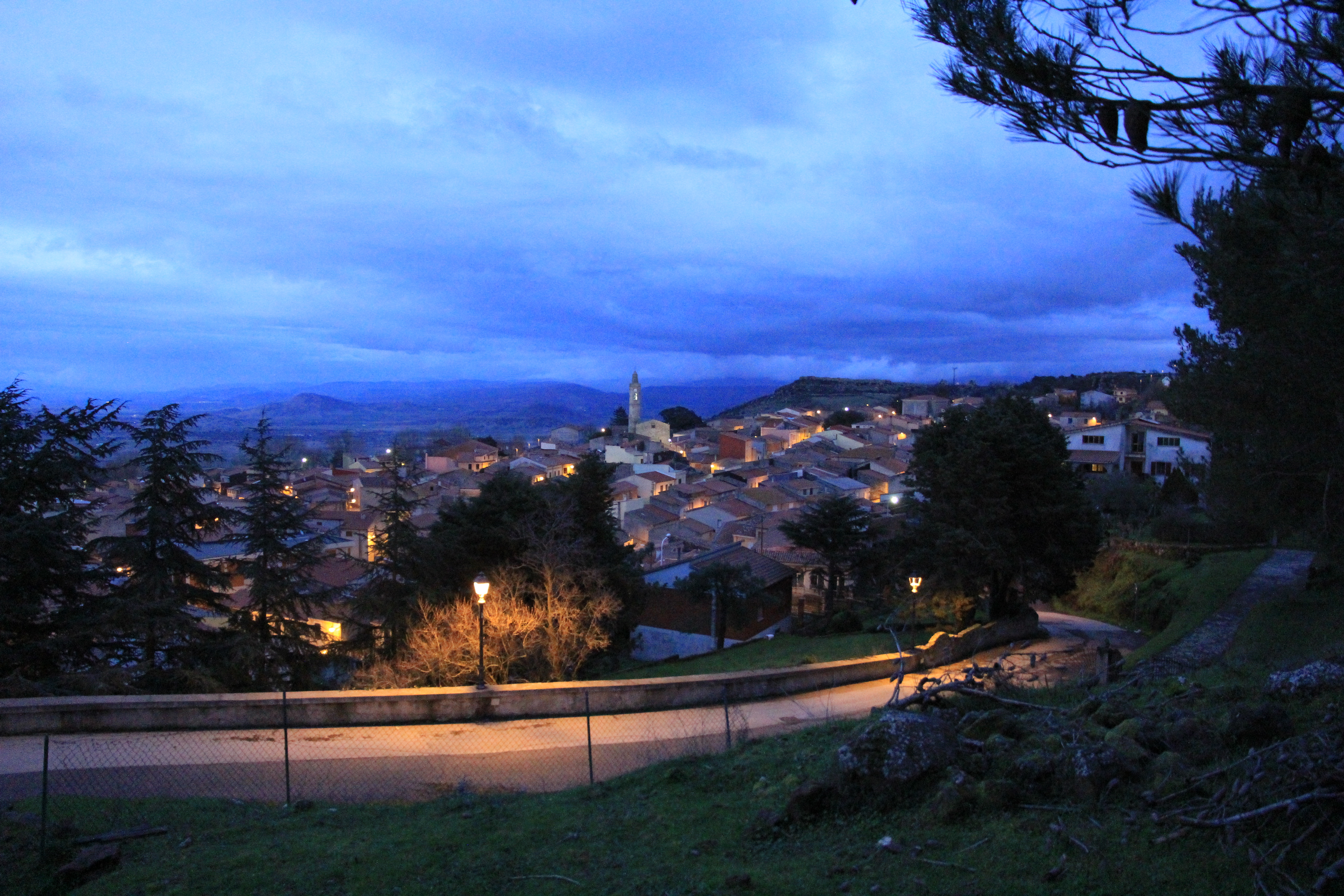 Giave (SS)